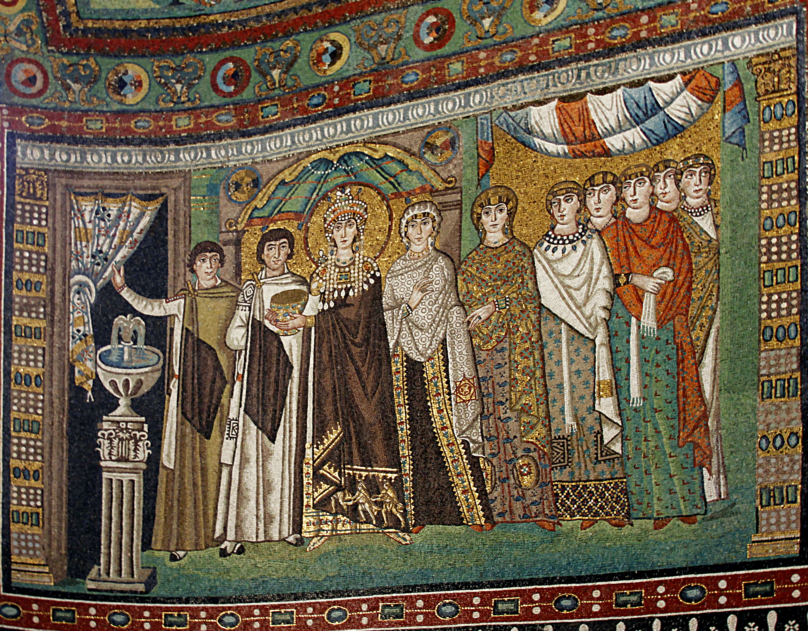 San Vitale - Ravenna